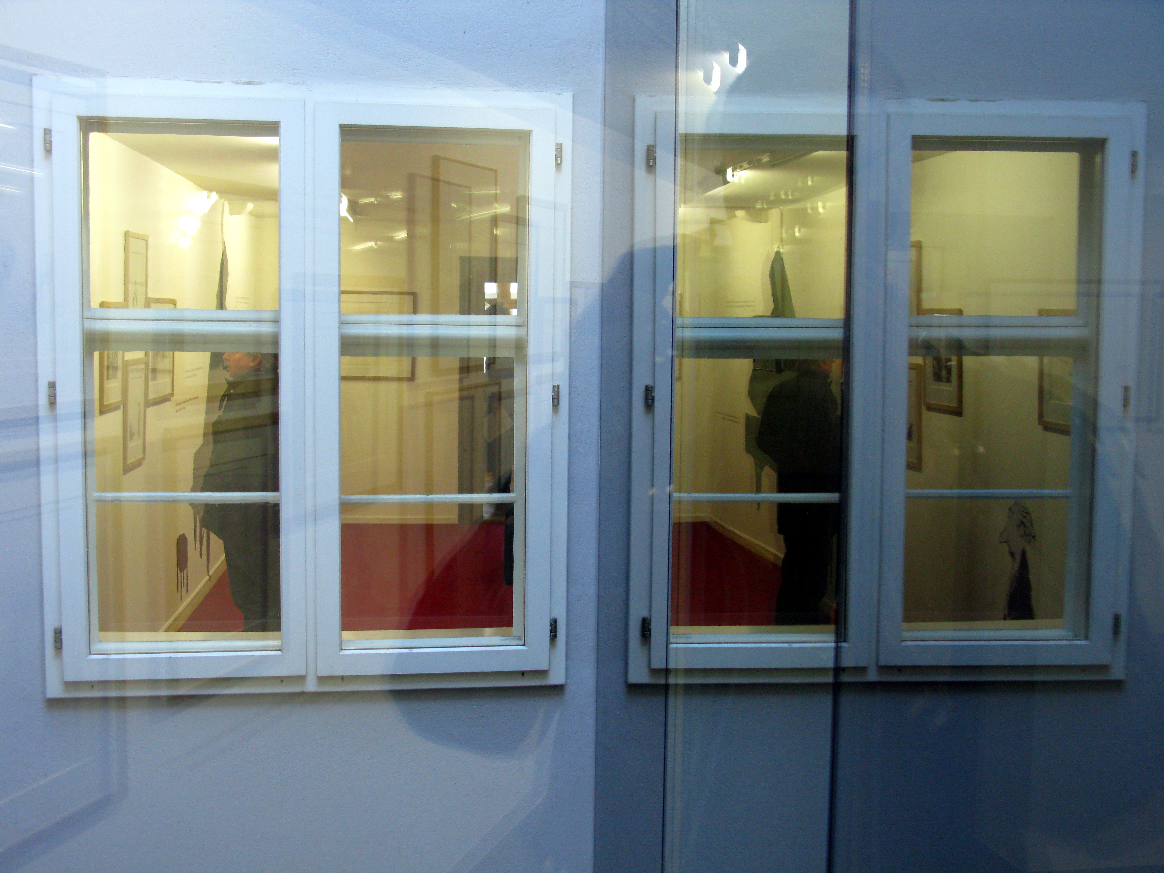 Blick vom Neubau in den Altbau, rechts der verglaste Übergang